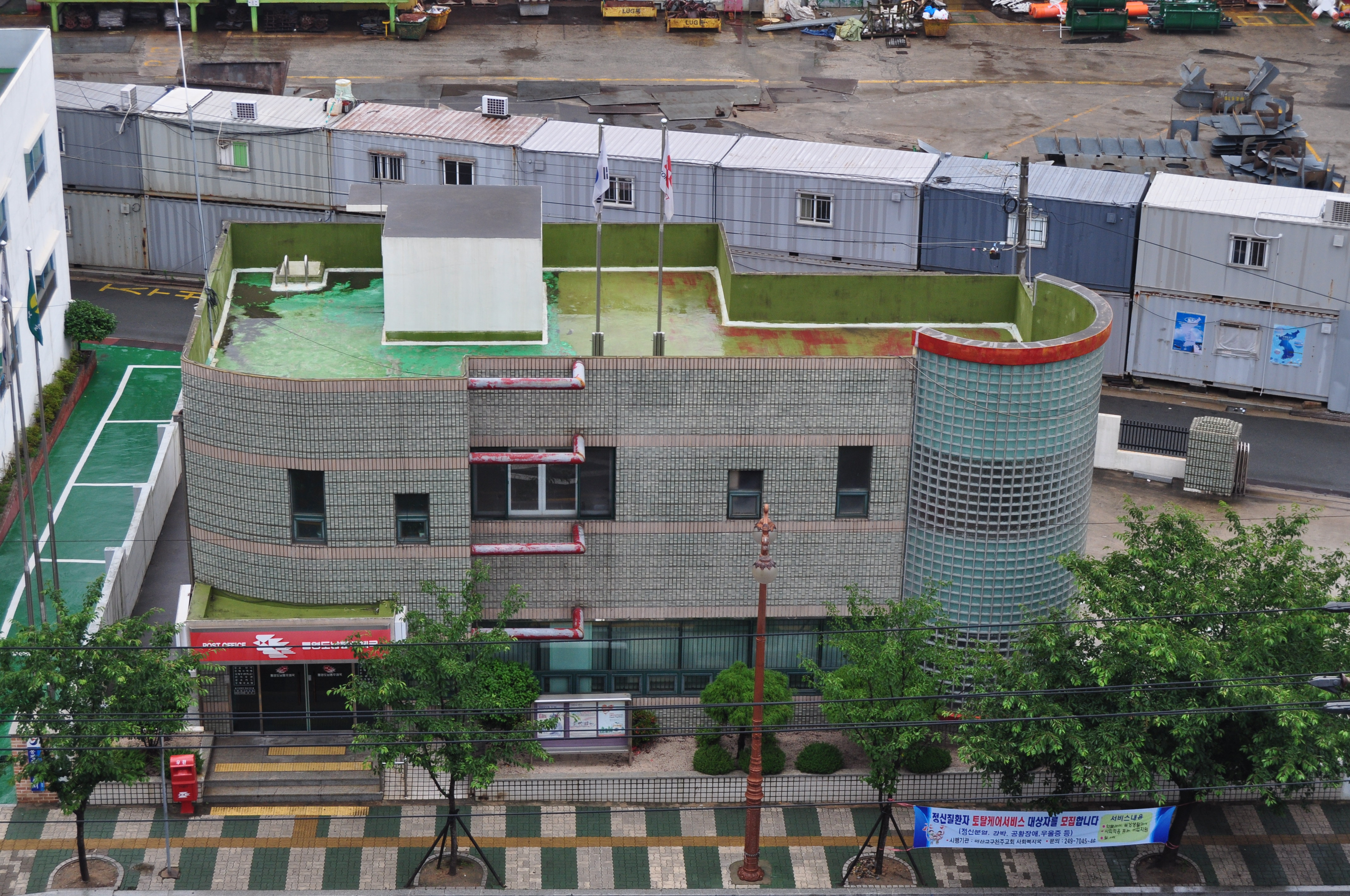 통영도남동 우체국 (경남 통영시 도남동)